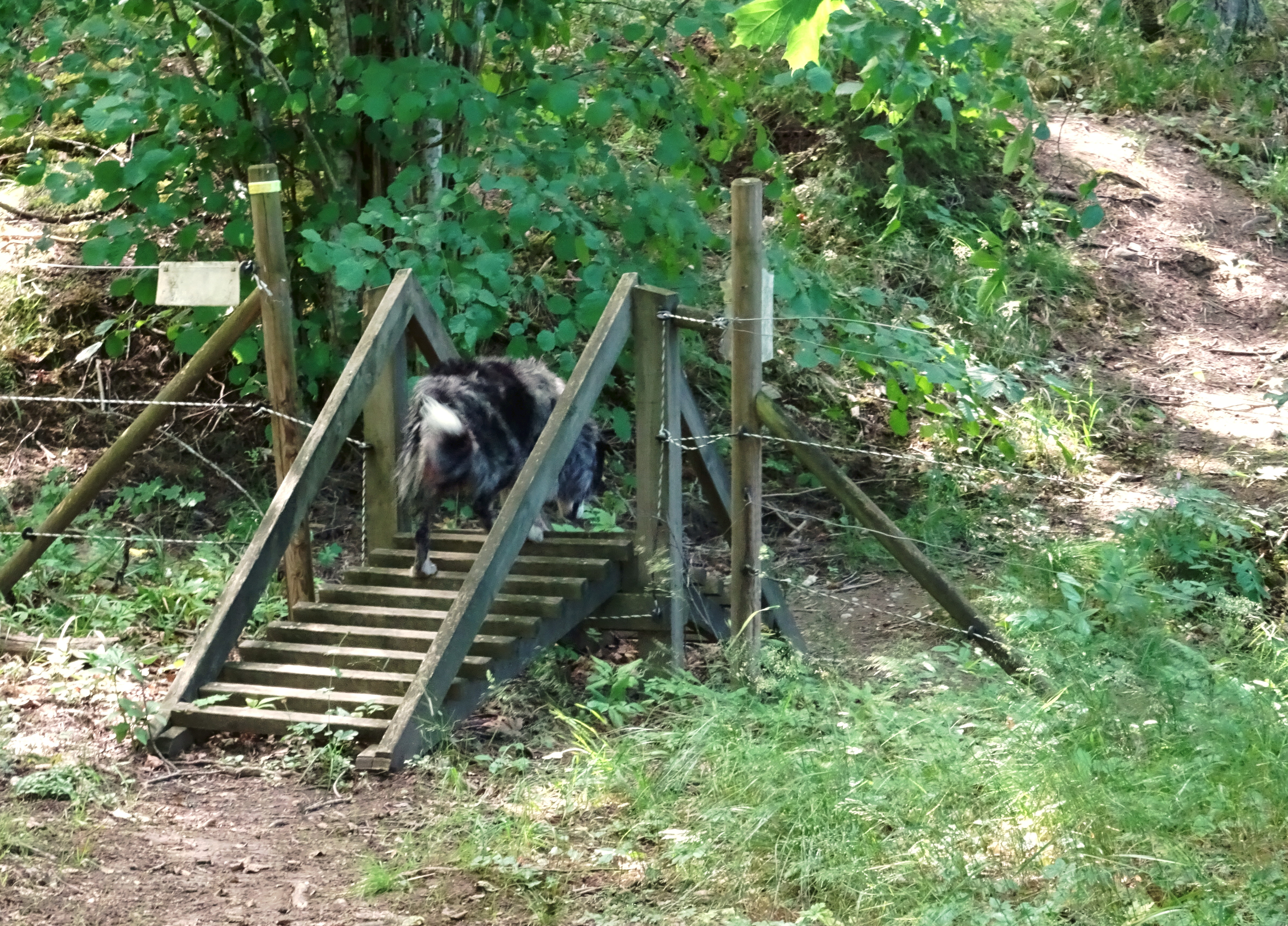 Bornsjöns natur- och kulturstig vid Skårby gård